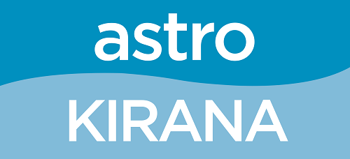 Logo saluran Astro Kirana